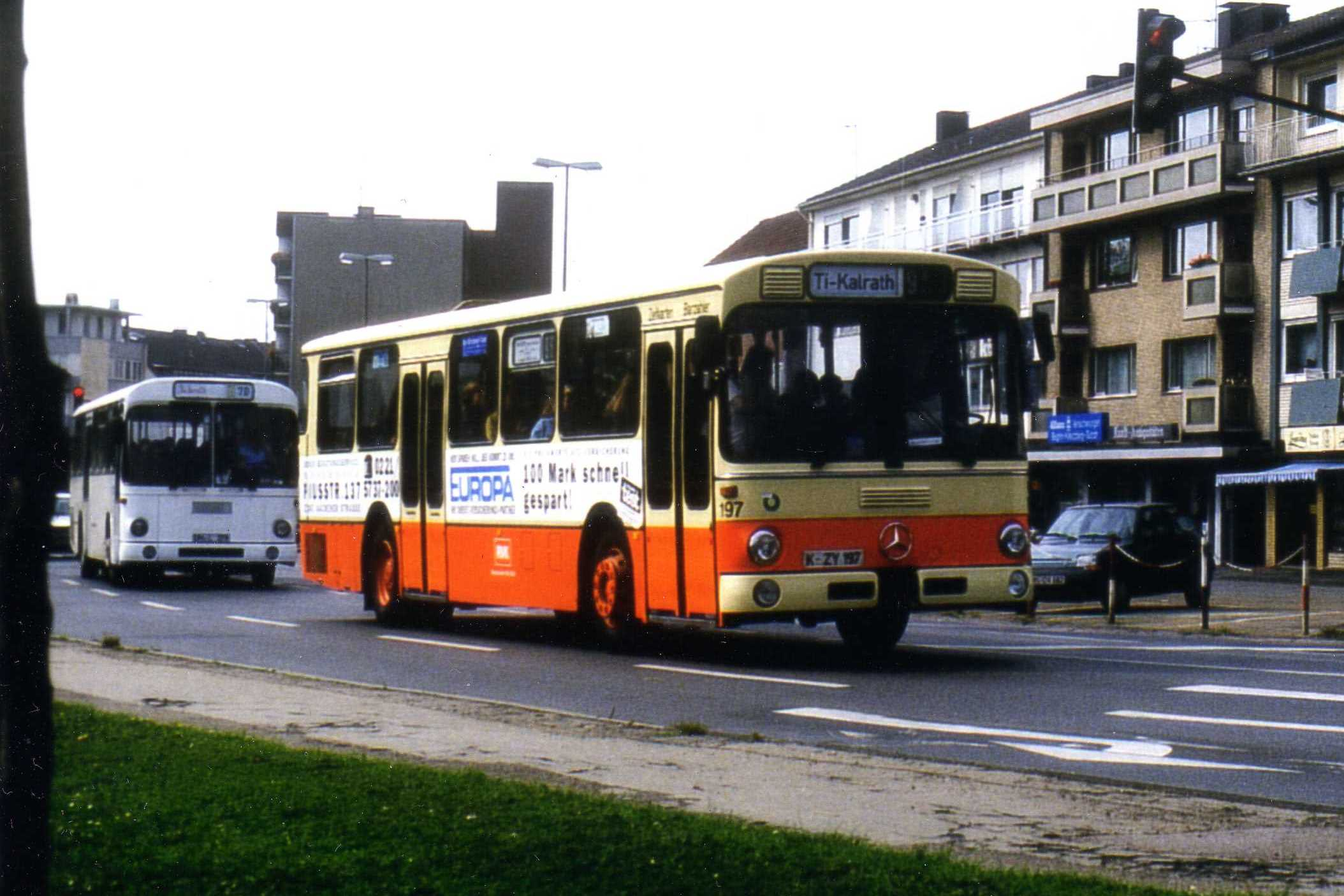 RVK-Bus der normalerweise nach Köln führenden Linie 963 als Schülerfahrt Nr. 539 nach Titz-Kalrath kurz hinter der Haltestelle Neues Rathaus in Jülich